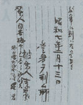 한국인 독립운동가 이봉창의 친필 옥중수기 일부